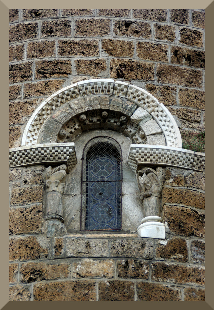 détail d'une ouverture de l'abside .